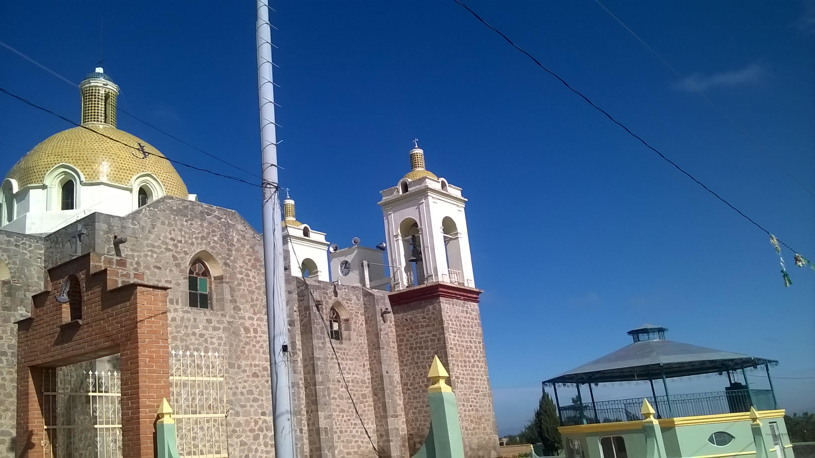 Iglesia de San José, San José Teacalco, Tlaxcala